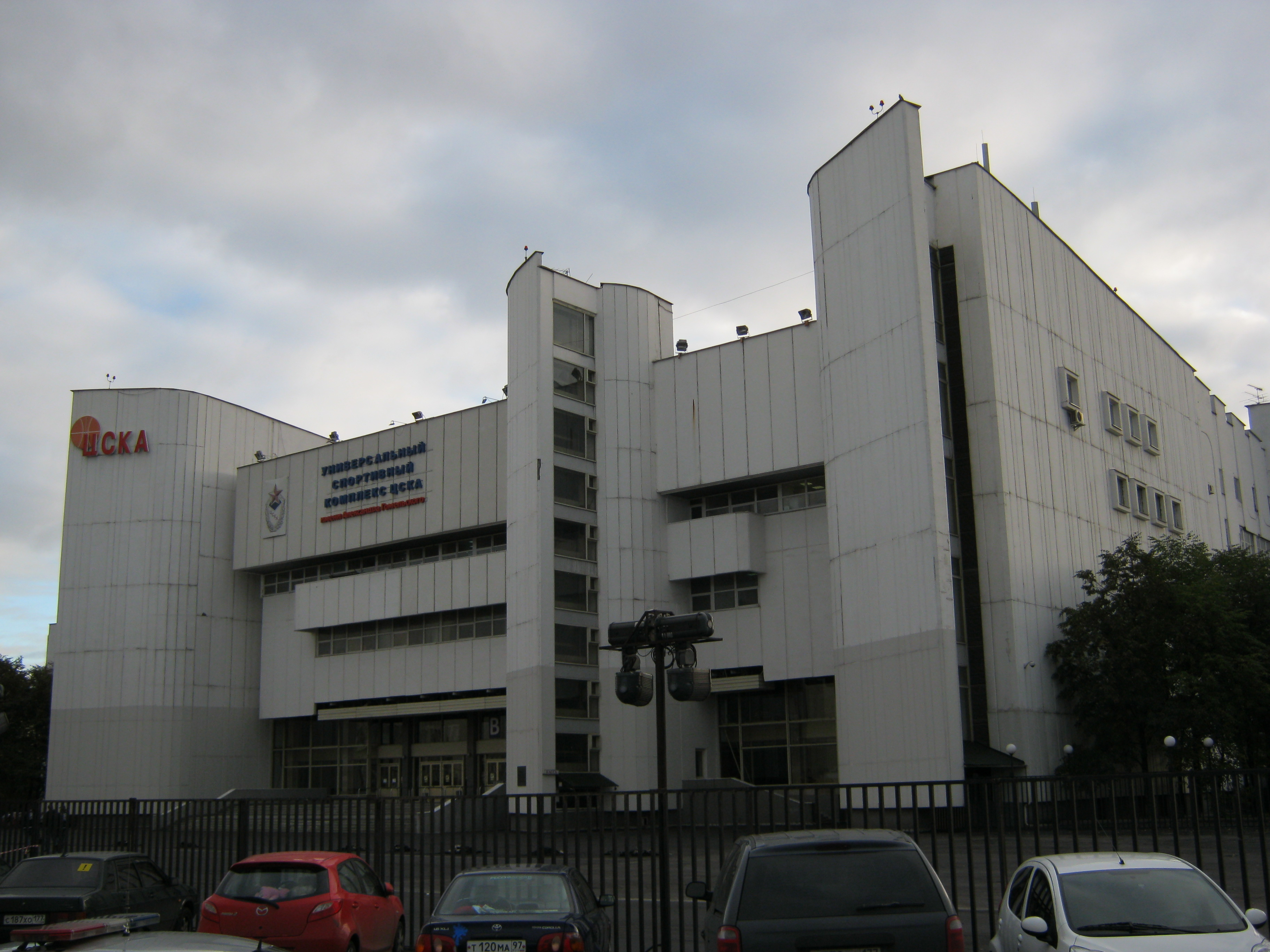 Универсальный спортивный комплекс ЦСКА. Сентябрь 2011